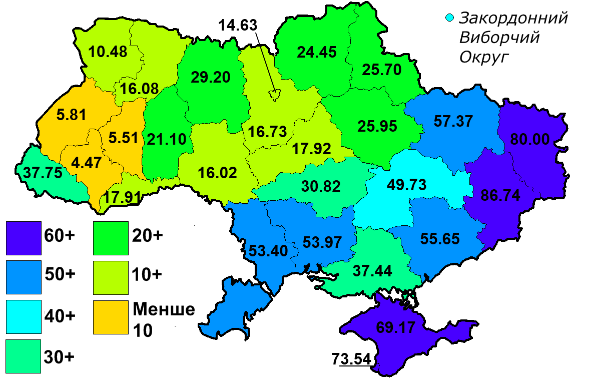 Результат Віктора Януковича на виборах 2004 року (І тур) за областями